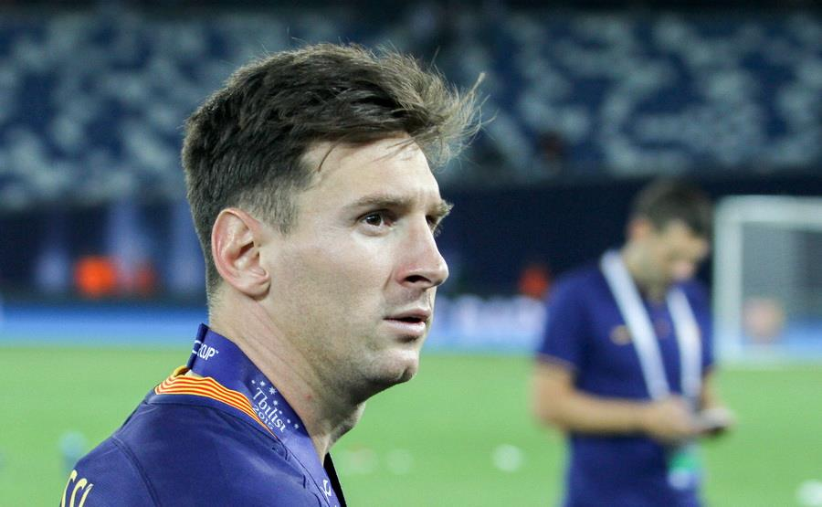 Матч за Суперкубок УЄФА 2015 року у Тбілісі. Грузія